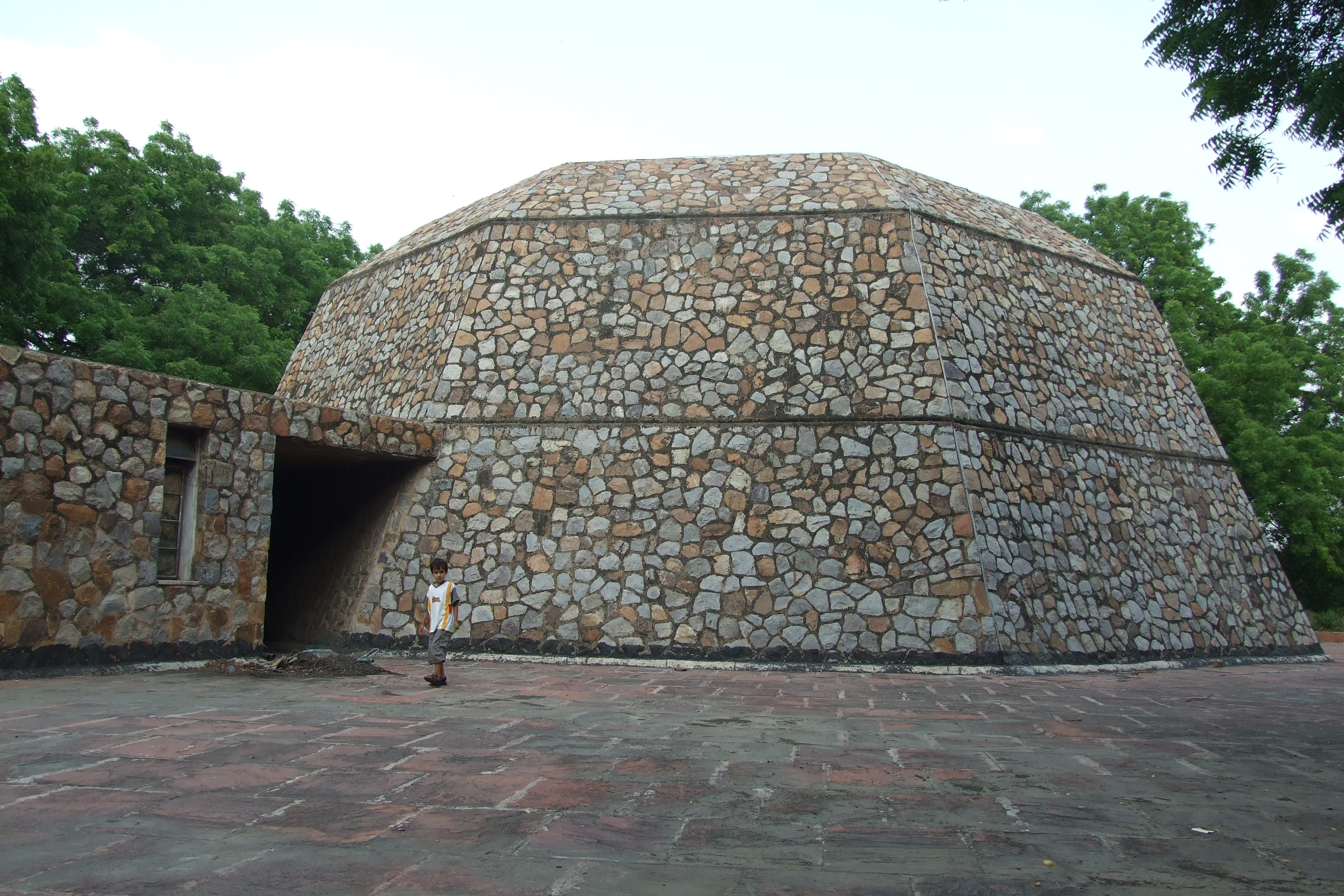 Nehru Planetarium, New Delhi, India.